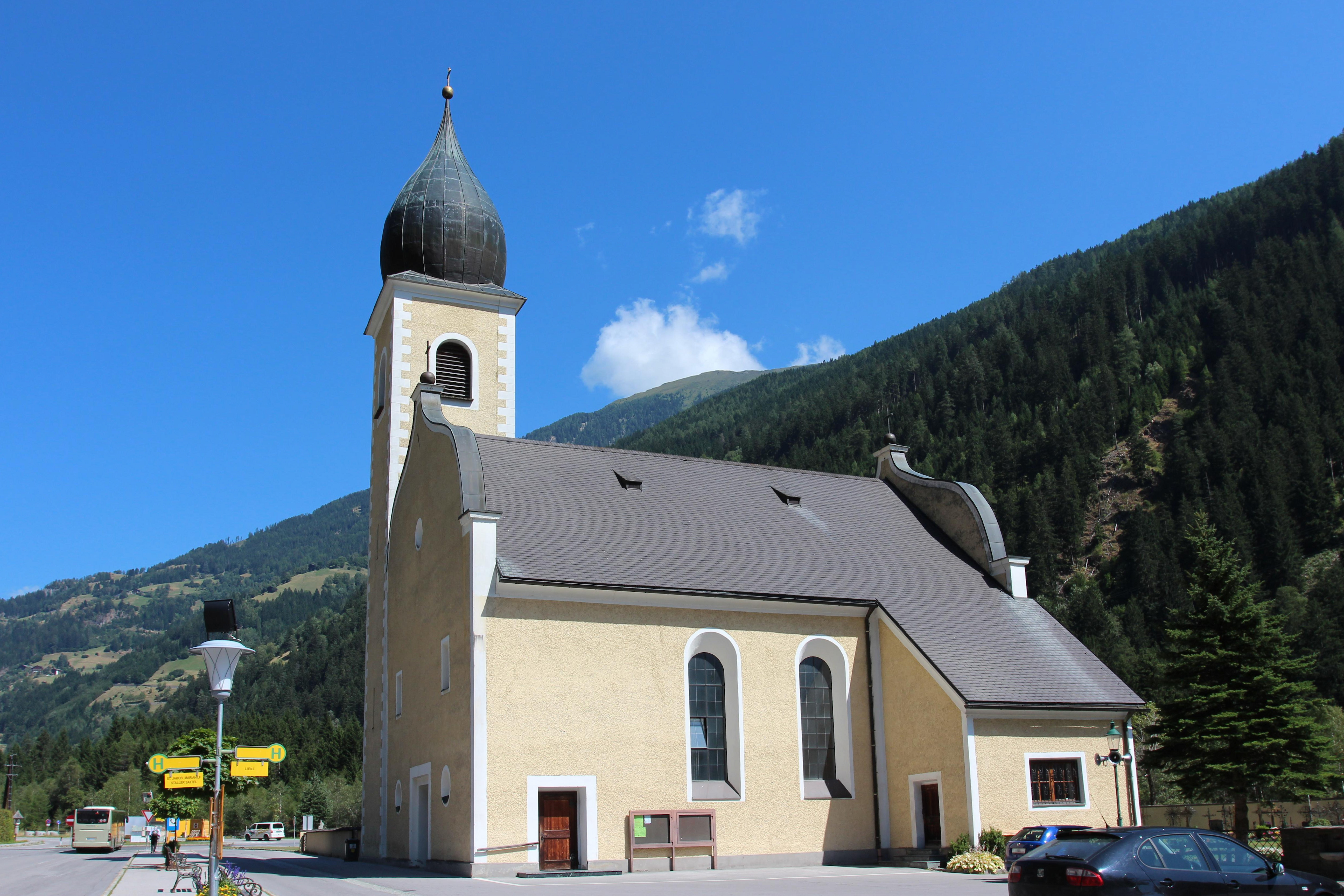 Herz-Jesukirche Huben - Matrei in Osttirol